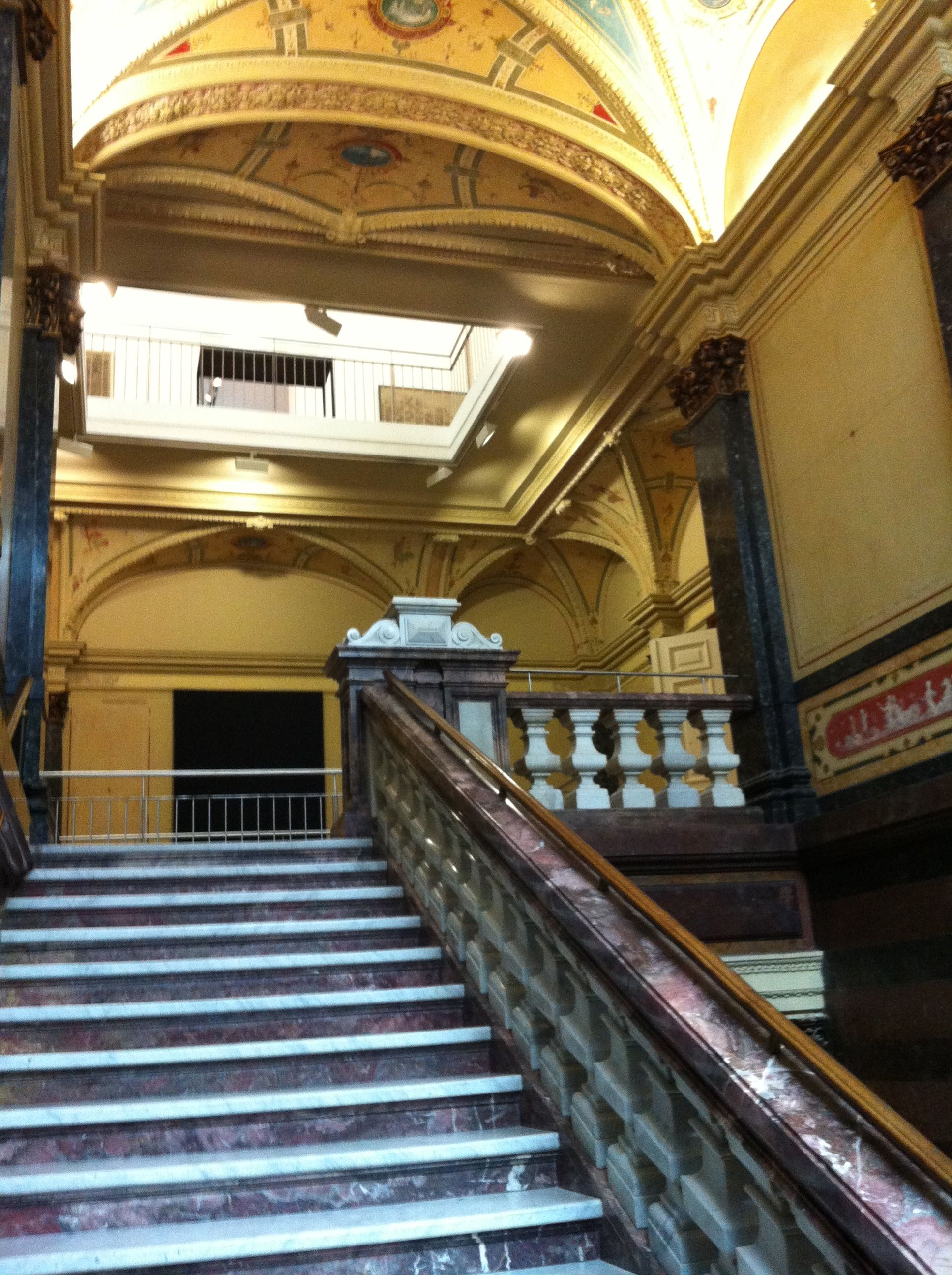 Treppenhaus im Suermondt-Museum in AachenThis is a photograph of an architectural monument., no. 0